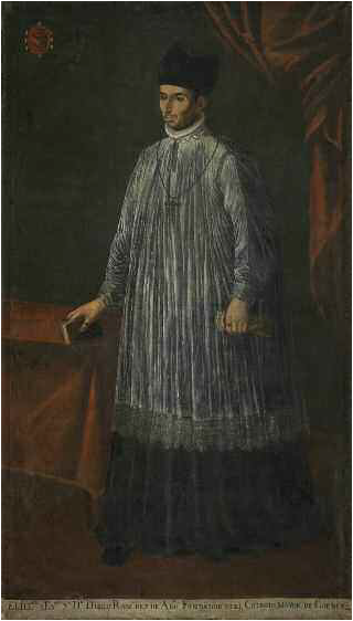 Retrato del eclesiástico español Diego Ramírez de Haro (1459-1537), que llegó a ser obispo de Astorga, Málaga y Cuenca.